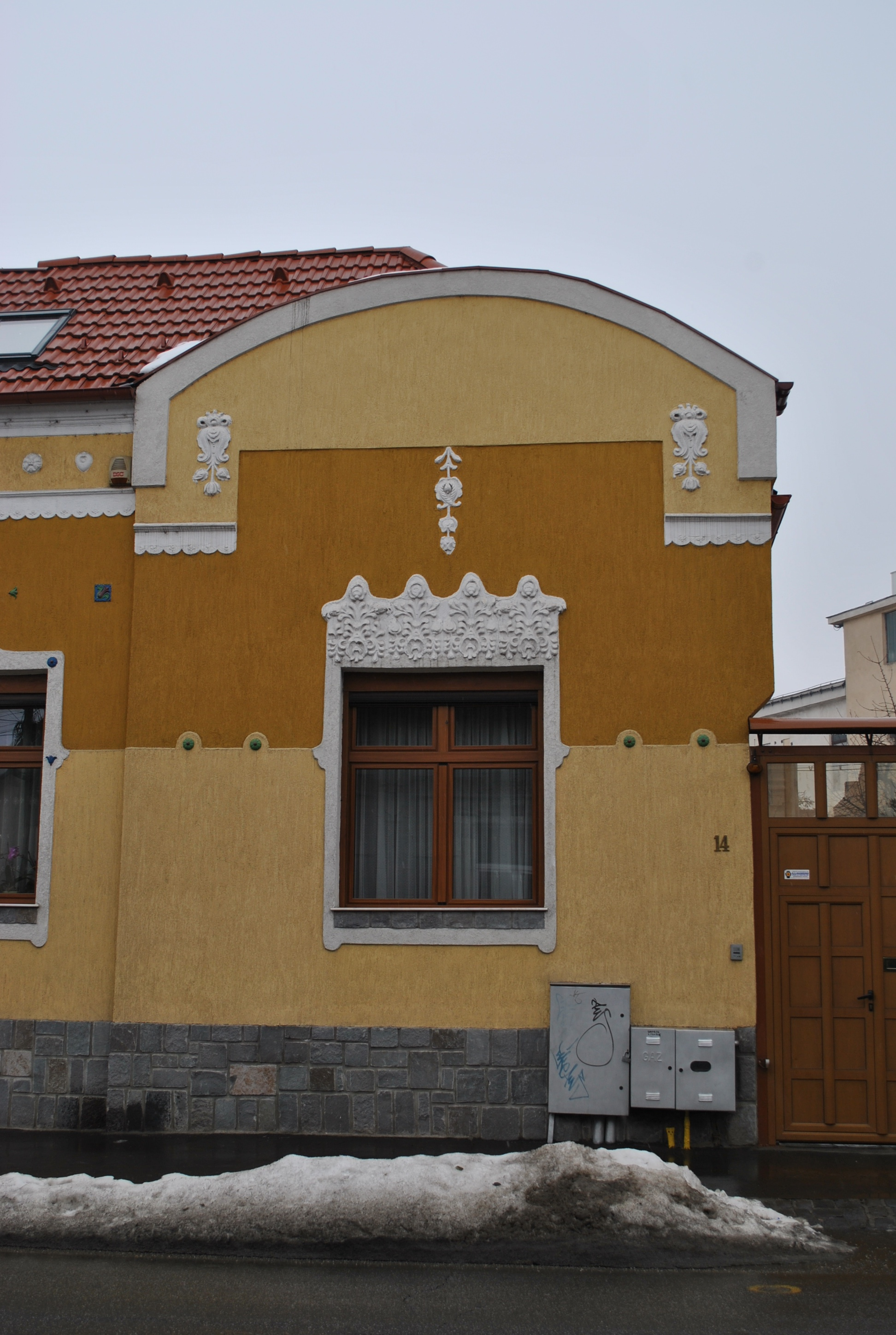 Casă, înc. sec. XX